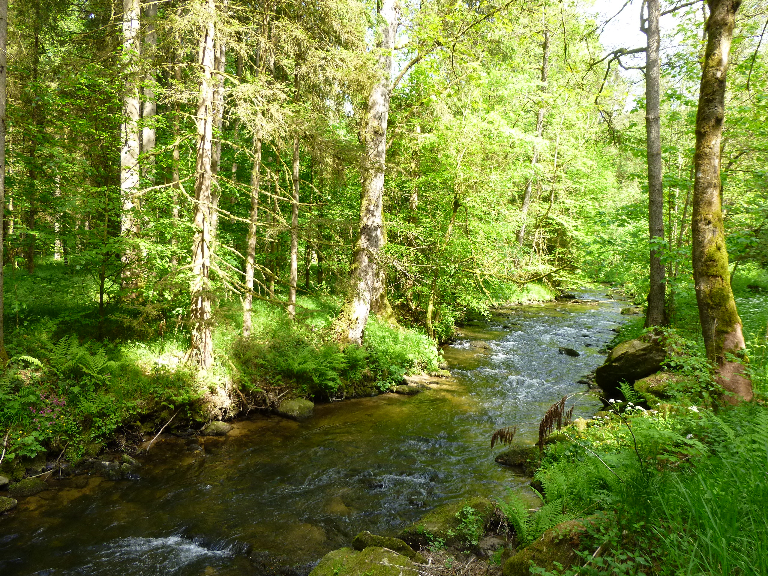 Das Perlbachtal zwischen Steinburg und Neukirchen (Landkreis Straubing-Bogen) liegt im Naturpark Bayerischer Wald.